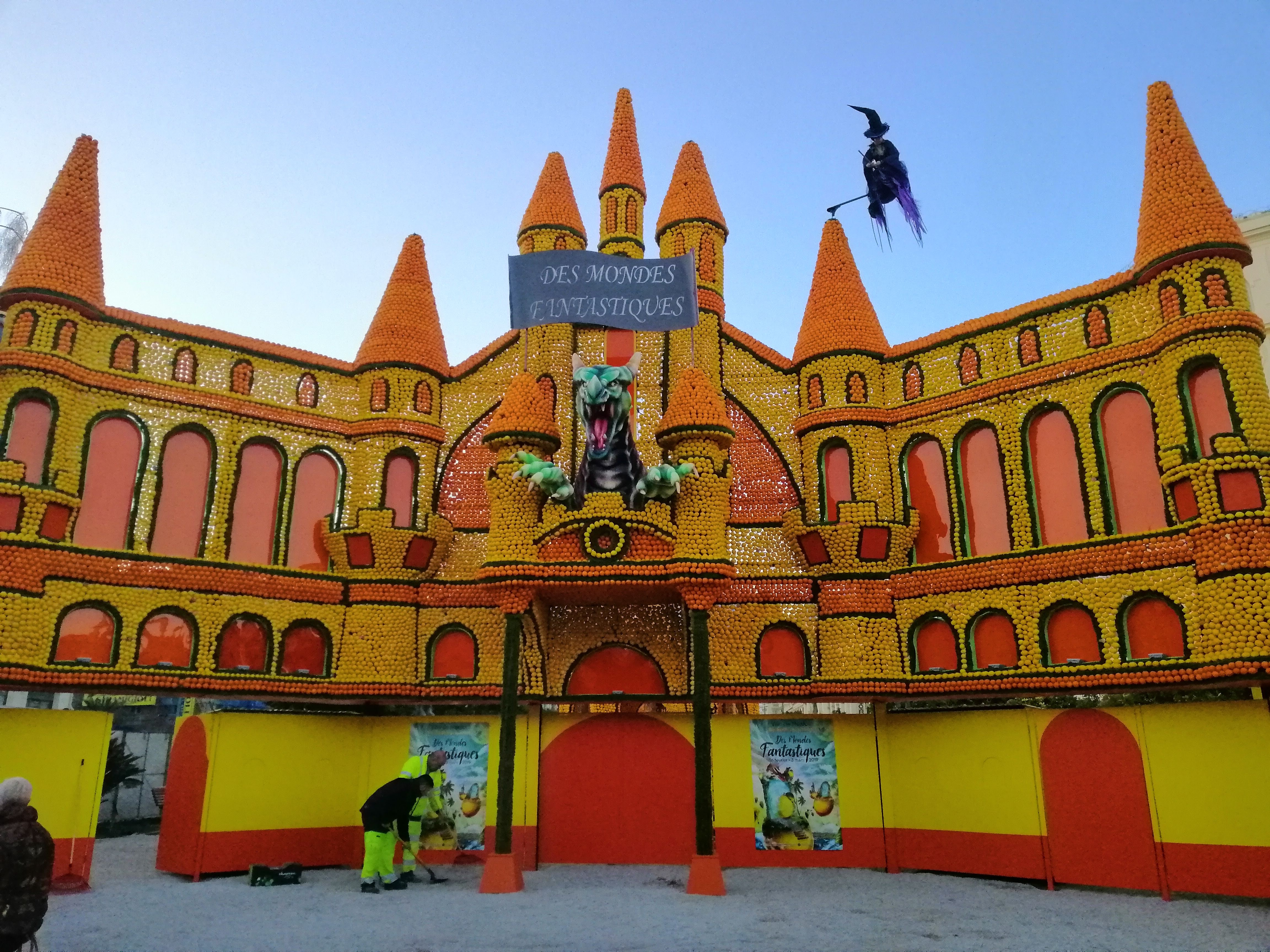 Ceci est la façade des jardins biovès avant l'inauguration officielle de la fête du citron 2019.